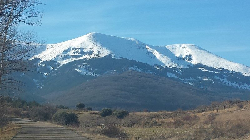 Monte Moncayo This is a photography of a Special Area of Conservation in Spain with the ID: ES2430028. Natura2000 entry, EEA entry